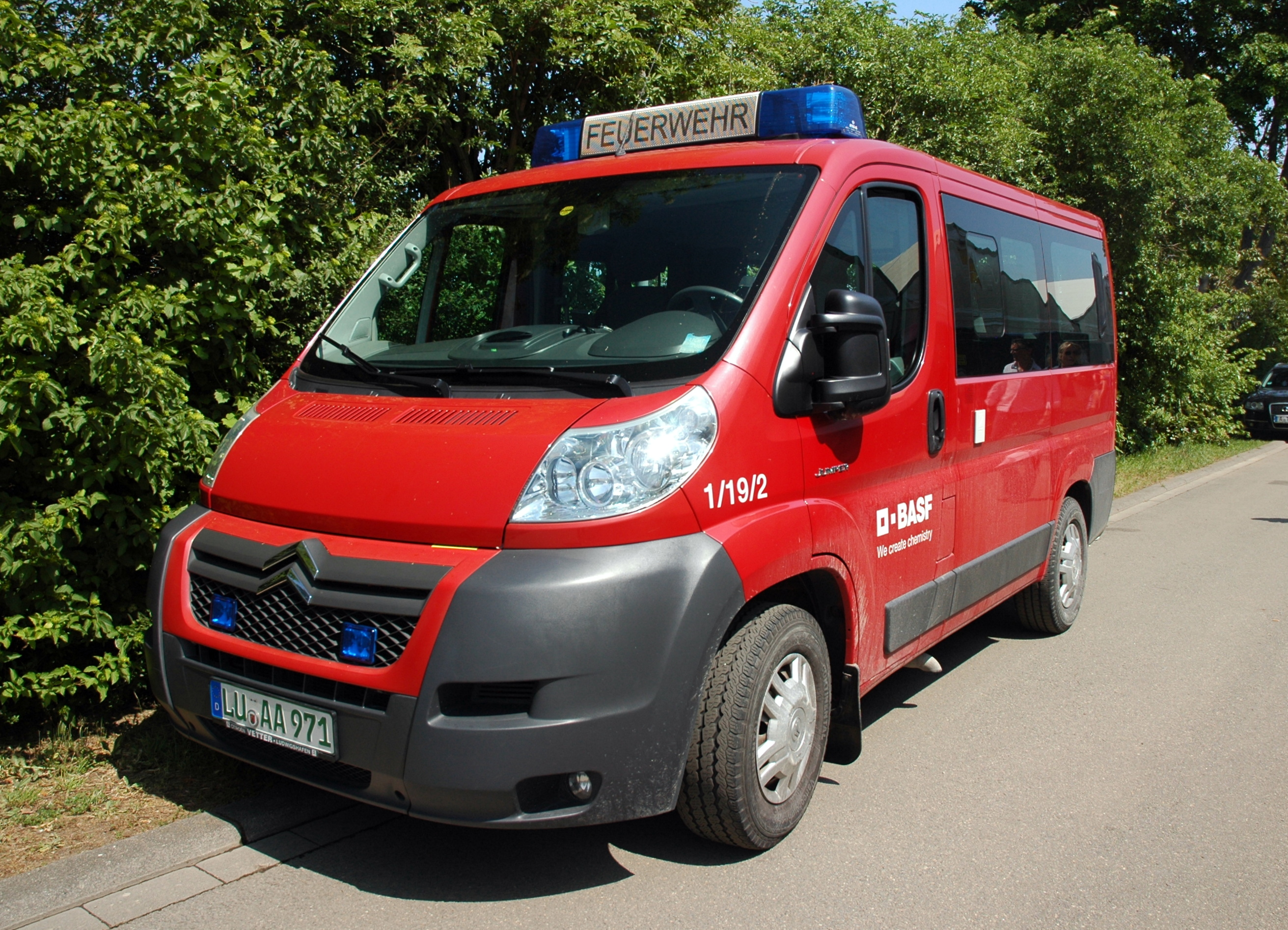 Maimarkt Mannheim 2019